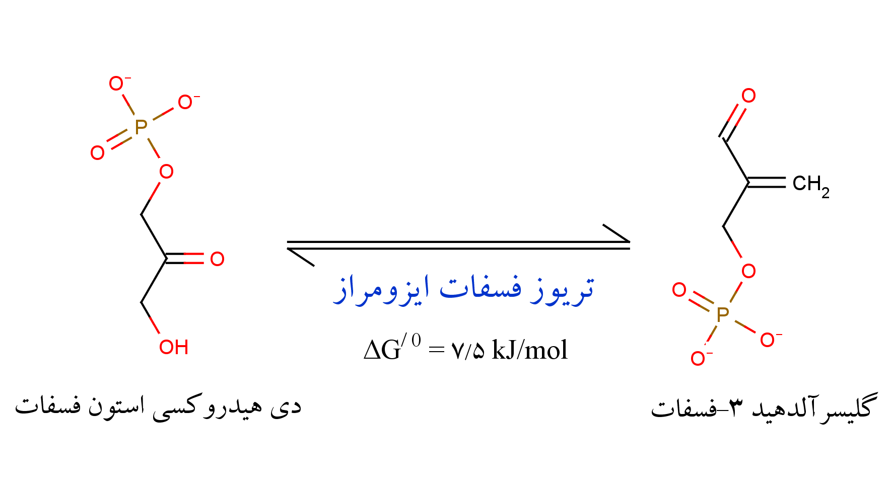 نمایش واکنش آنزیم تریوز فسفات ایزومراز و تبدیل دی‌هیدروکسی استون فسفات به گلیسرآلدهید ۳-فسفات